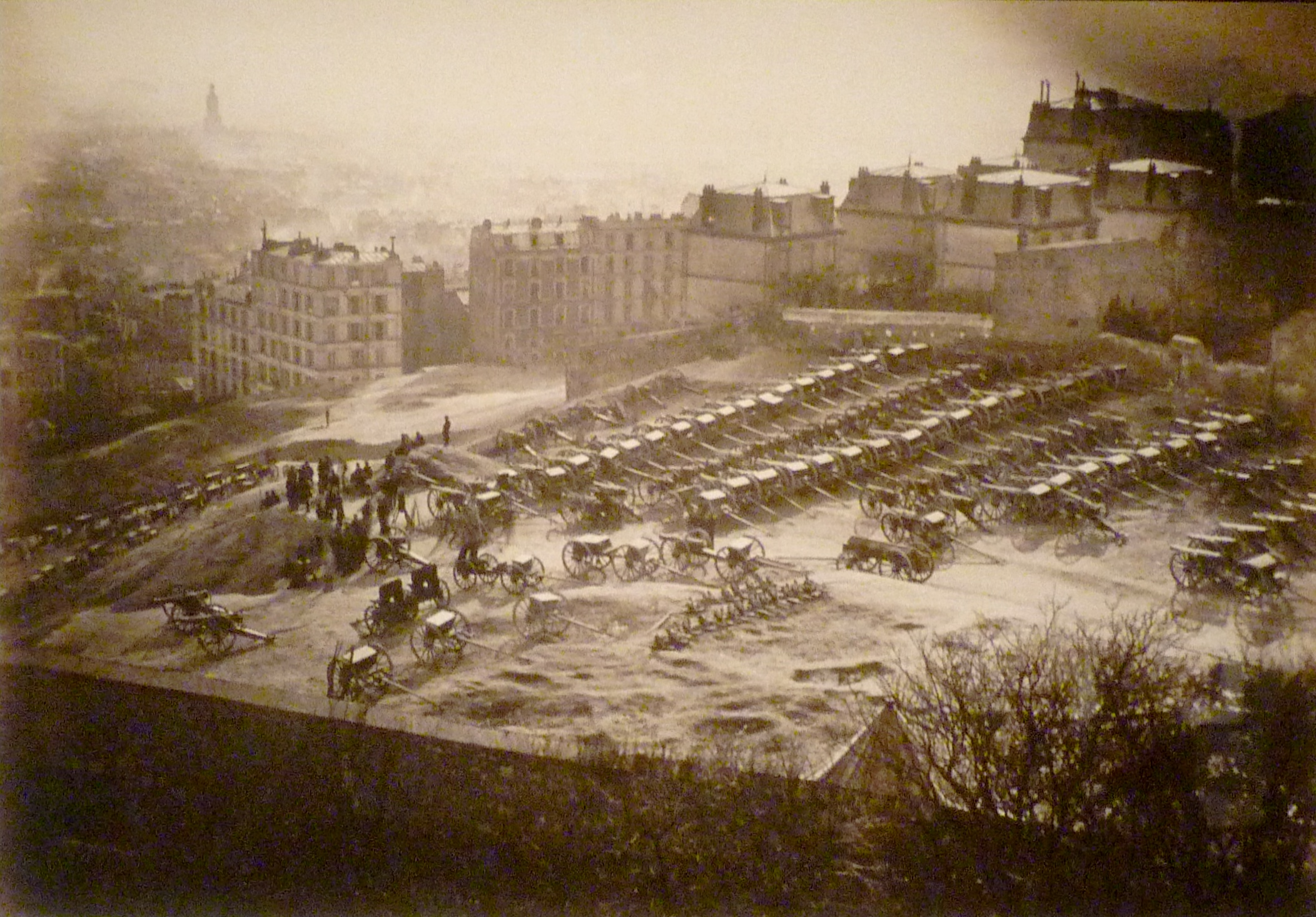 Exposition La Commune de Paris à l'Hôtel de Ville de Paris (18 mars - 28 mai 2011) - Les canons des parisiens sur la butte Montmartre, le 18 mars 1871 - Photo, fonds du musée Carnavalet.